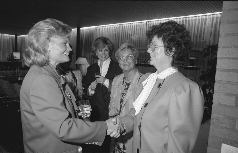 21.4.1988 Hannelore Kohl gibt ein Abendessen für weibliche Mitglieder der Bundestagsfraktionen der CDU/CSU und FDP im Kanzlerbungalow